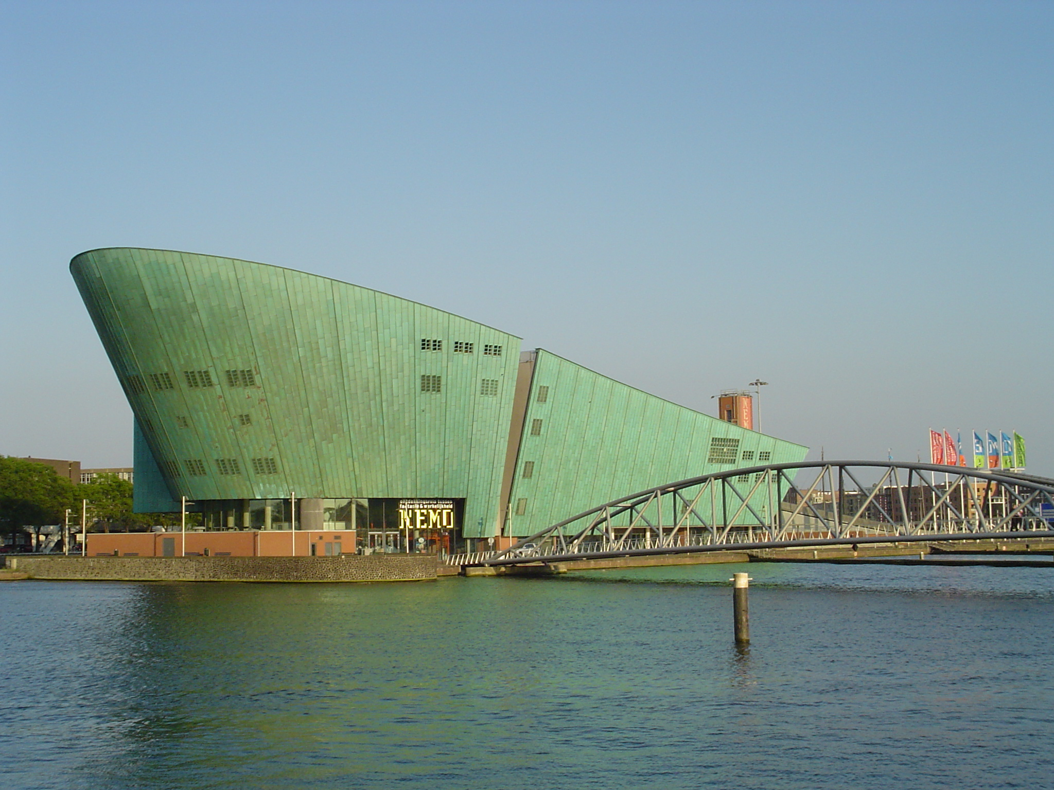 Foto gemaakt van het Nemo te Amsterdam.